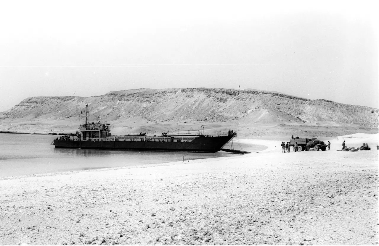 נחתת 36 מטר תוצרת מספנות ישראל של חיל הים הישראלי באי טיראן, 1968